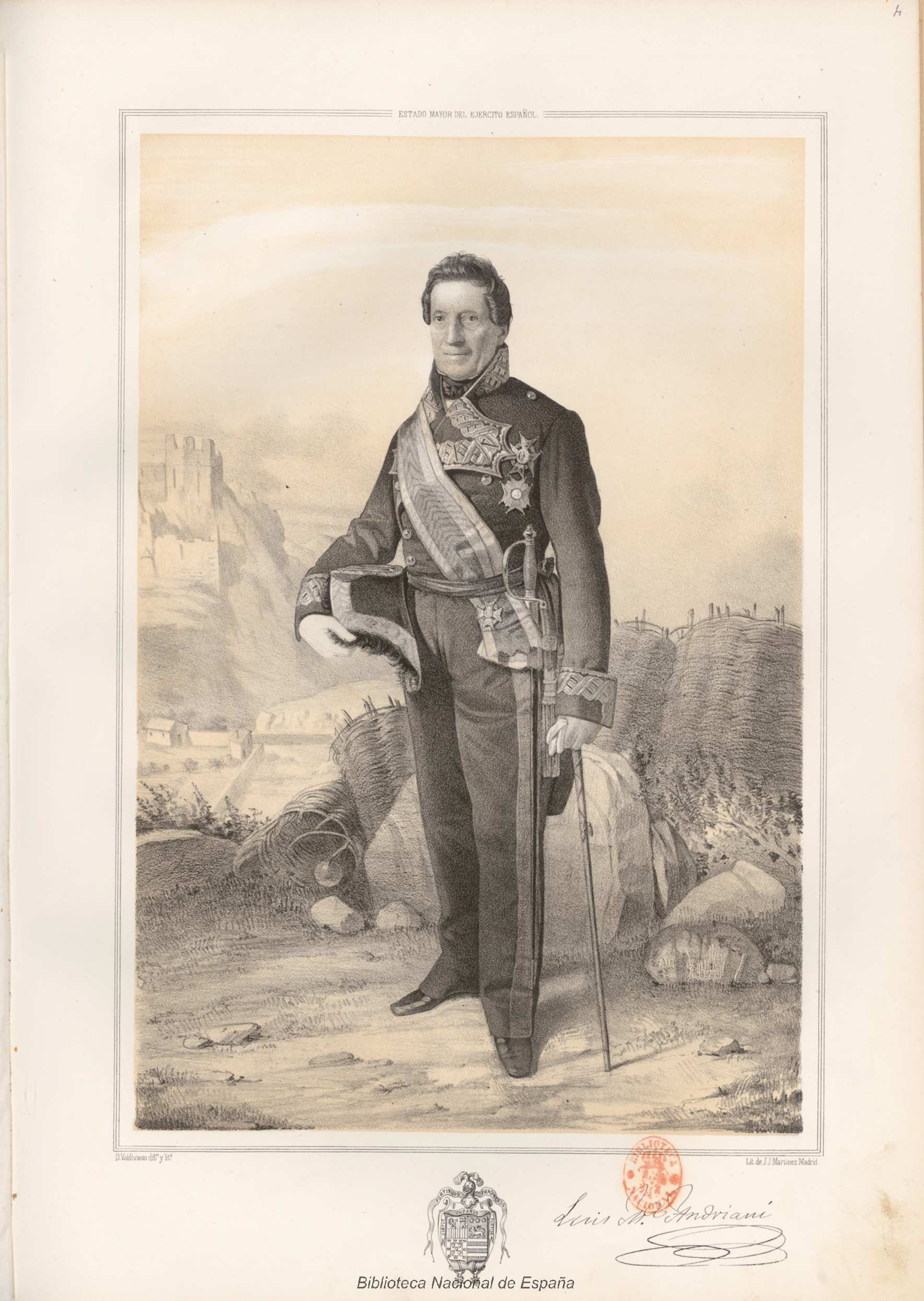 Luis María Andriani. Dibujo y litografía de Domingo Valdivieso para "Estado Mayor General del Ejército